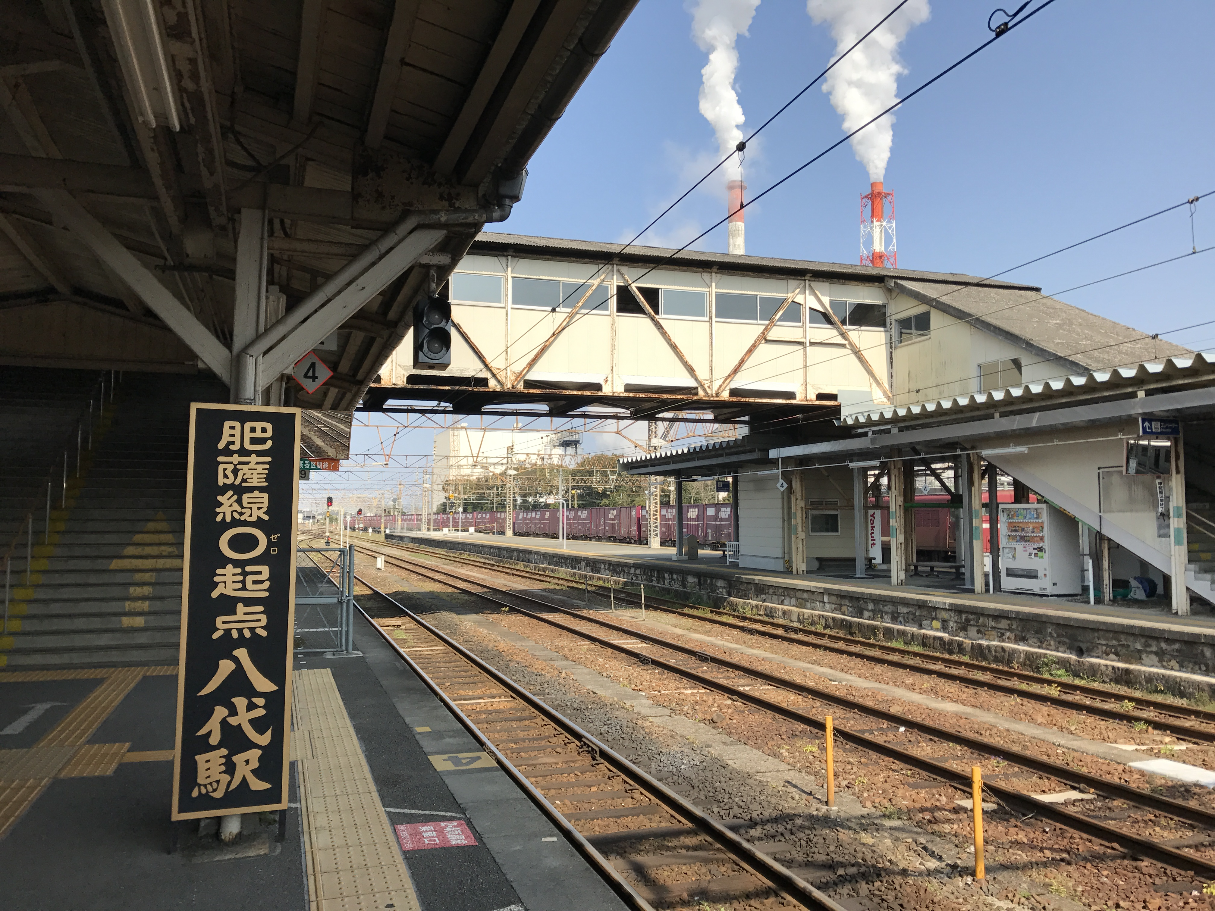 八代駅のホーム(奥は新八代方面)